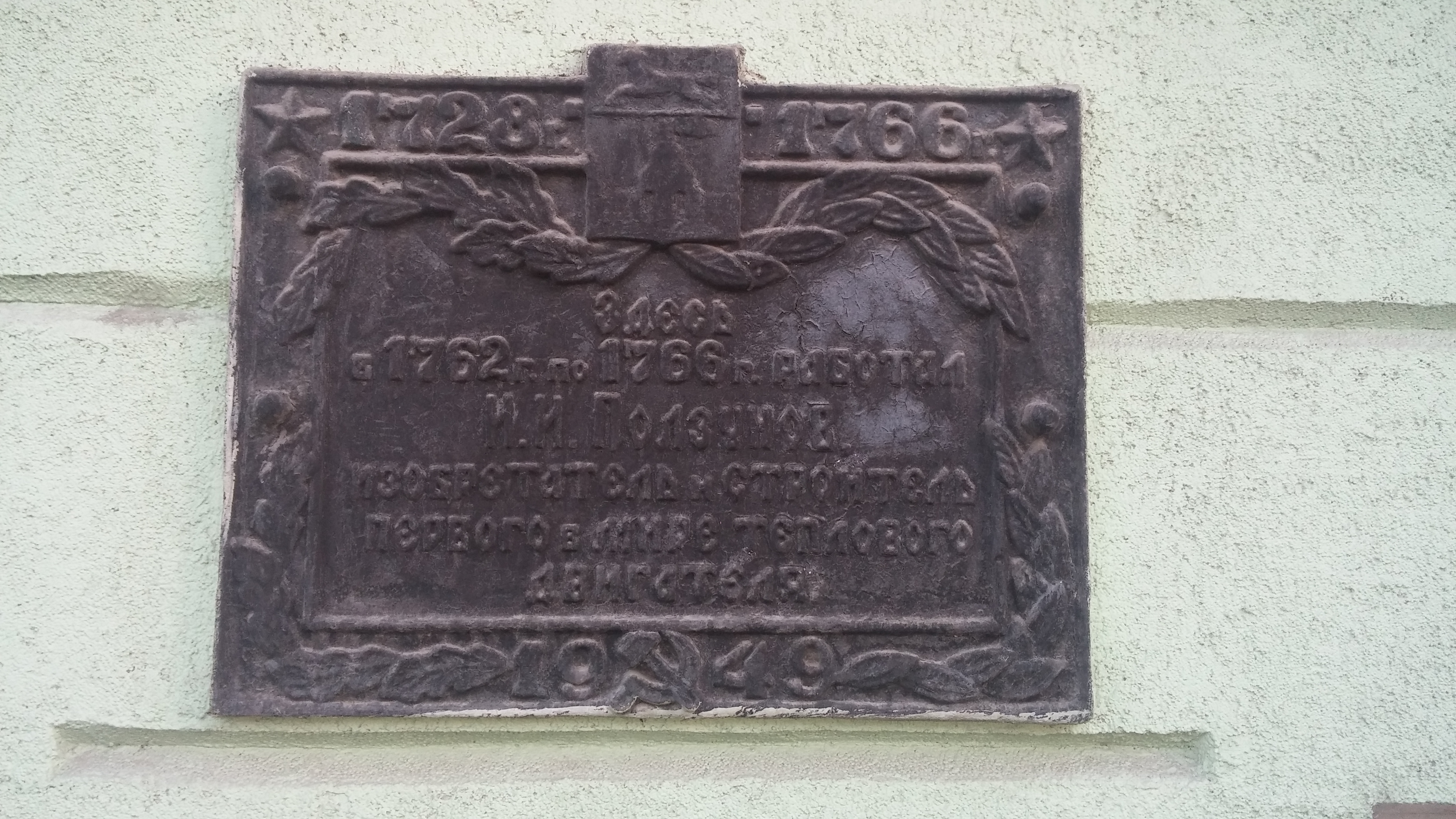 Мемориальная доска Ивану Ивановичу Ползунову: улица Ползунова, 41 (Республики улица, 39), Барнаул, Алтайский край